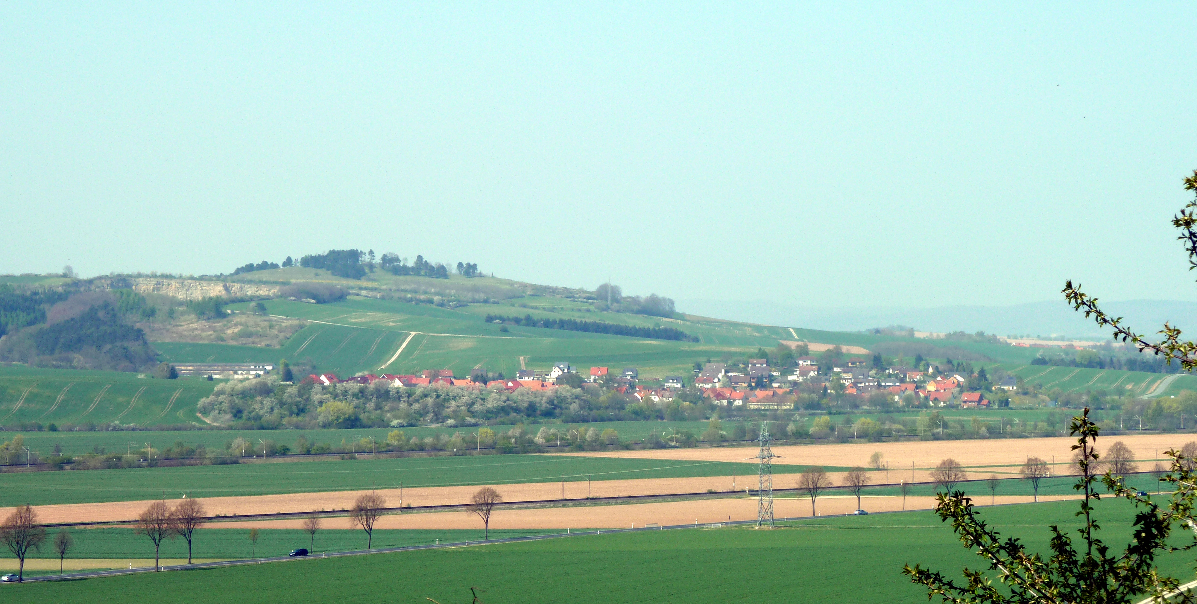 Blick von Südsüdosten über das Leinetal auf Elvese, Flecken Nörten-Hardenberg, Landkreis Northeim, Südniedersachsen. Links hinter dem Ort der Wahrberg (z.T. Naturschutzgebiet).